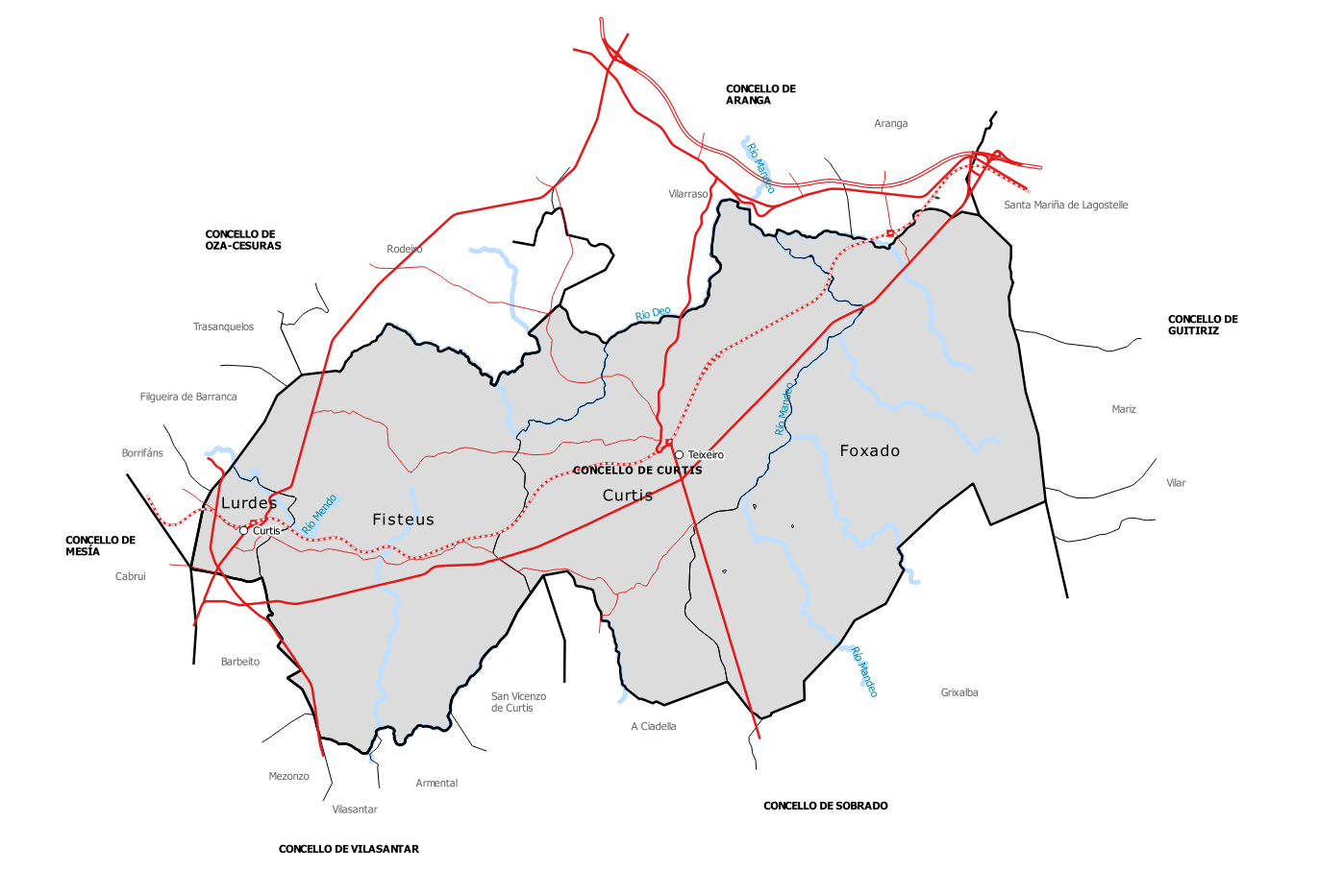 Mapa de parroquias do concello de Curtis (Galiza).